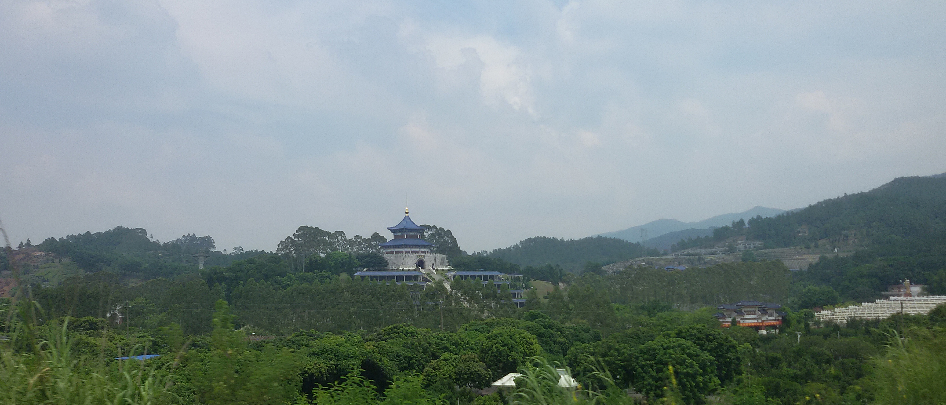 粵語: 正果萬安園